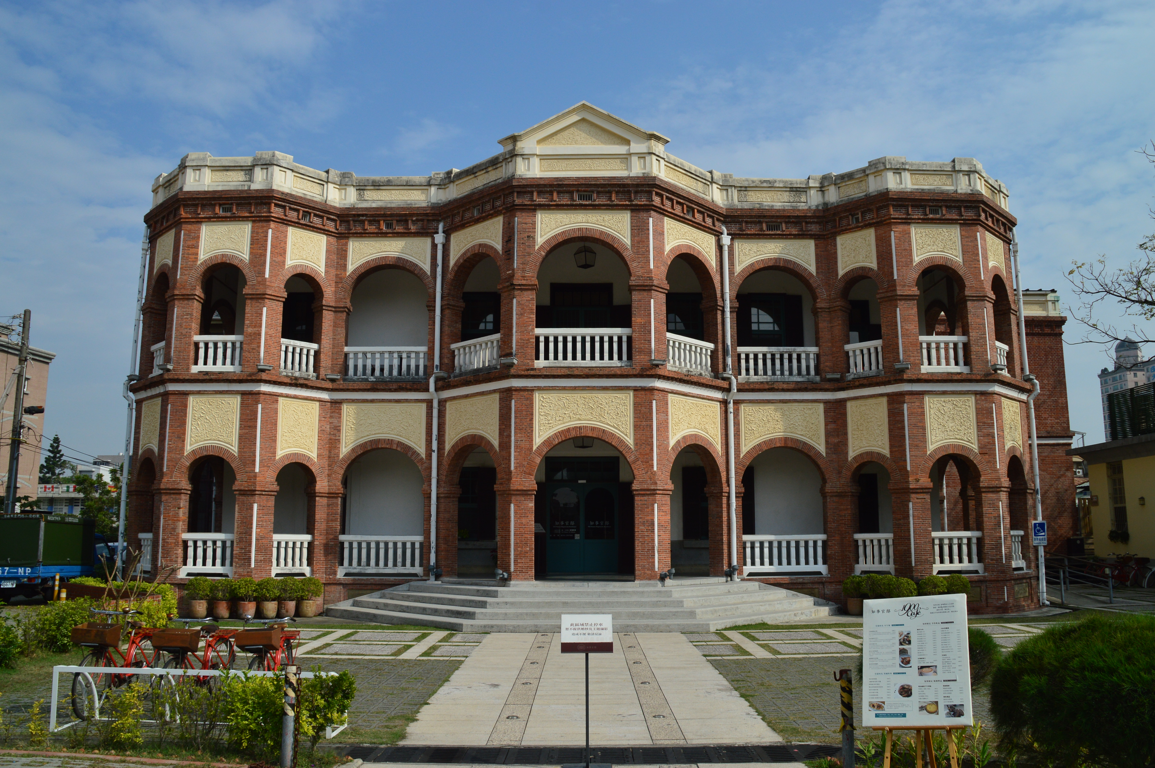 中文（台灣）: 臺南縣知事官邸